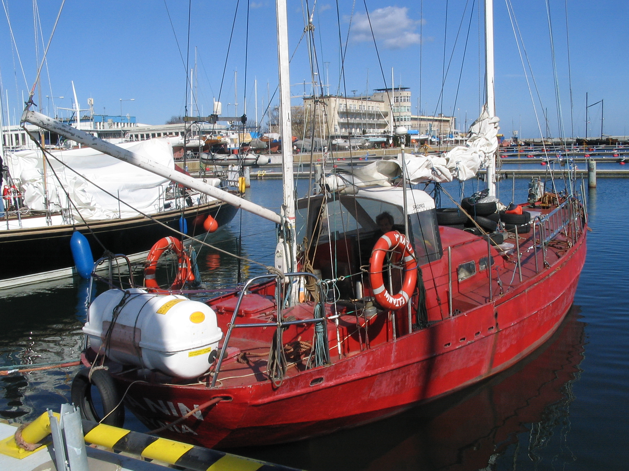 SV "Eltanin" w porcie jachtowym w Gdyni. Widoczny również kapitan statku - Jurek Różański. SV "Eltanin" in marina in Gdynia (Poland). Master of the boat - Jurek Rozanski - is also visible.